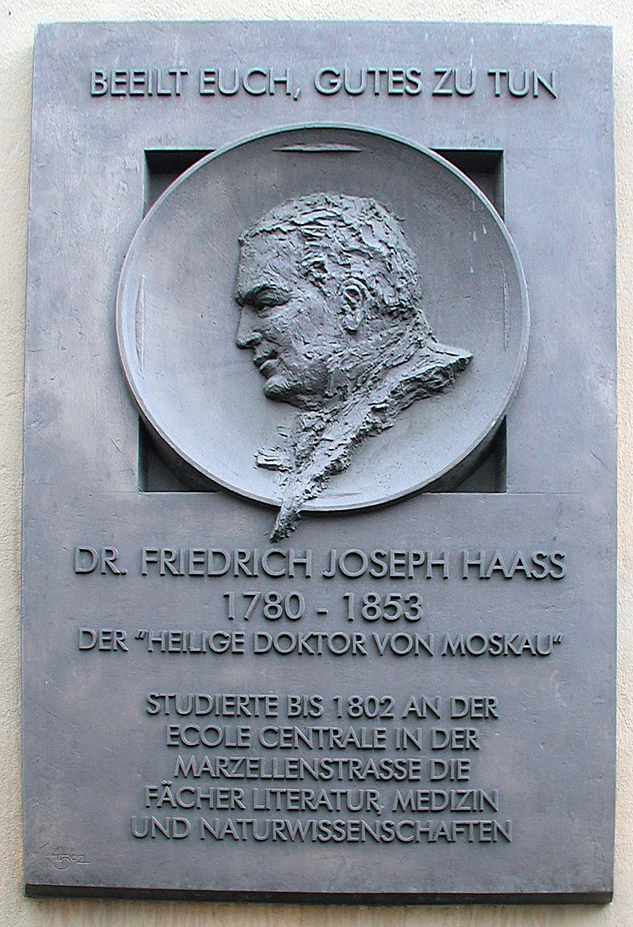 Gedenktafel für Friedrich-Joseph-Haass am Haus des erzbischöflichen Generalvikariats Marzellenstr. 32 in Köln. Entwurf: Herbert Halfmann, Düren. Höhe 140 cm. Aufgestellt 2002. Änderungen: verzerrt Uploaded with Reworkhelper